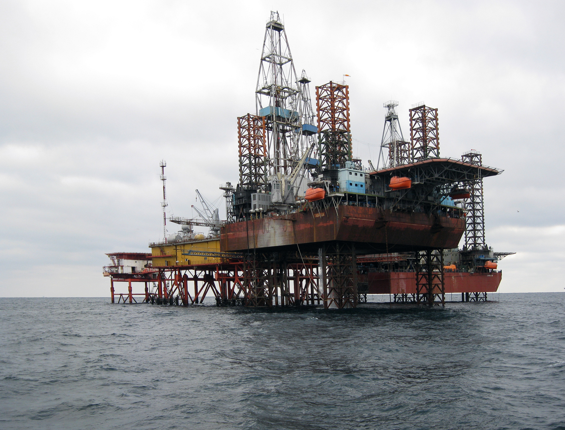 Платформа ЧНГ